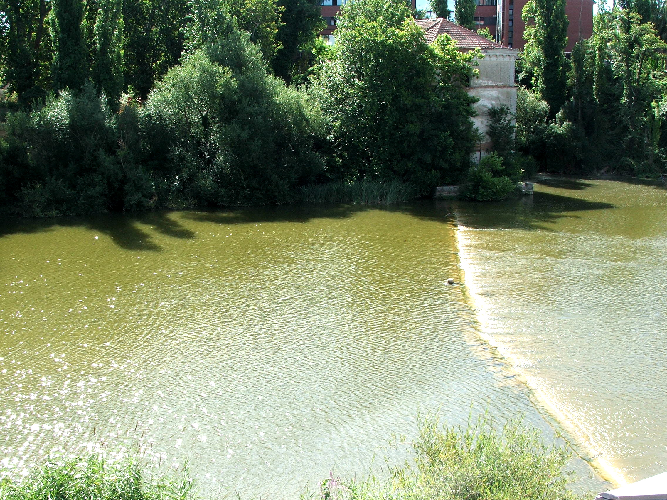 Imagen del río Duero a su paso por Tudela de Duero (España)